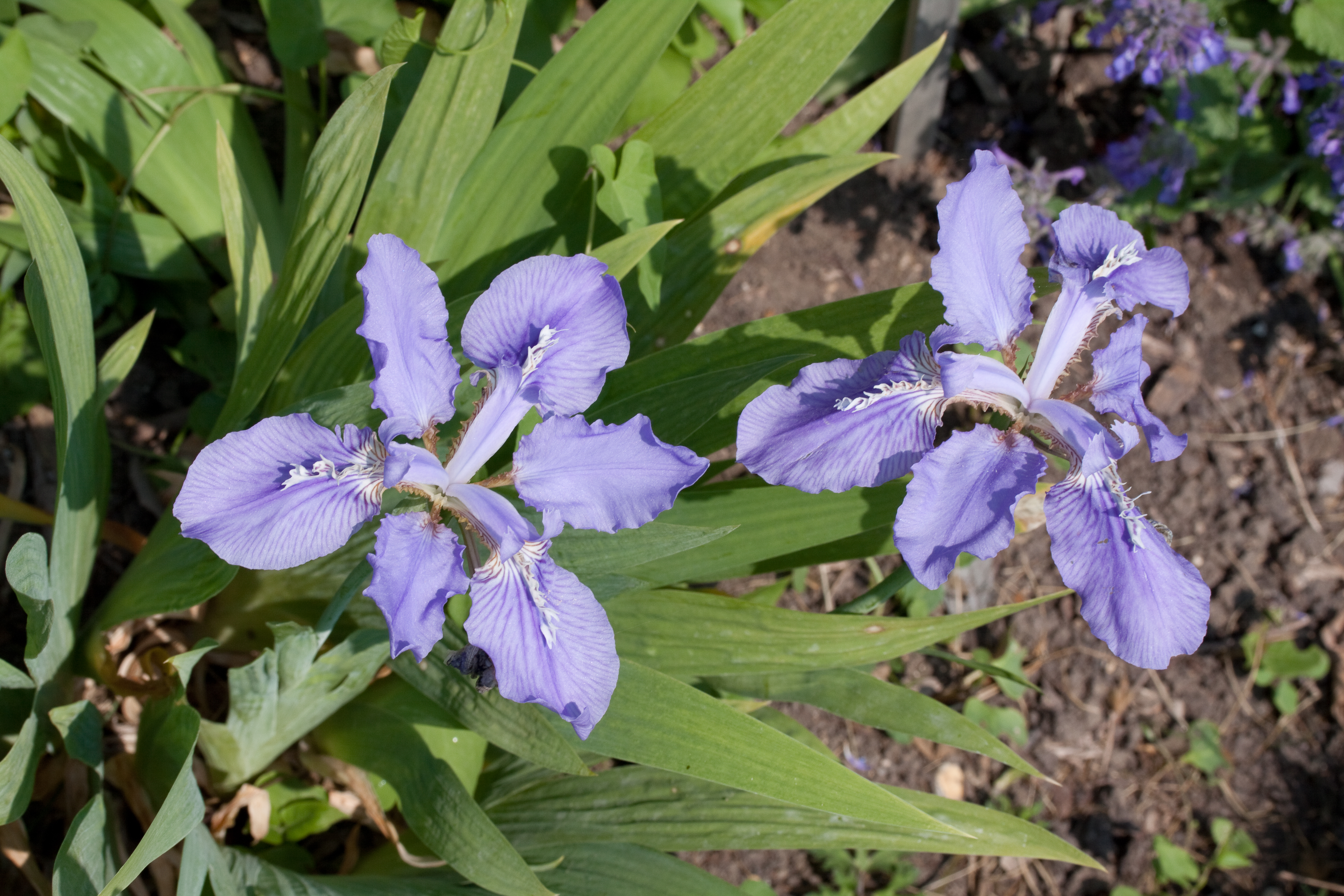 Fleurs d'Iris Milesii au Jardin des Plantes - Paris